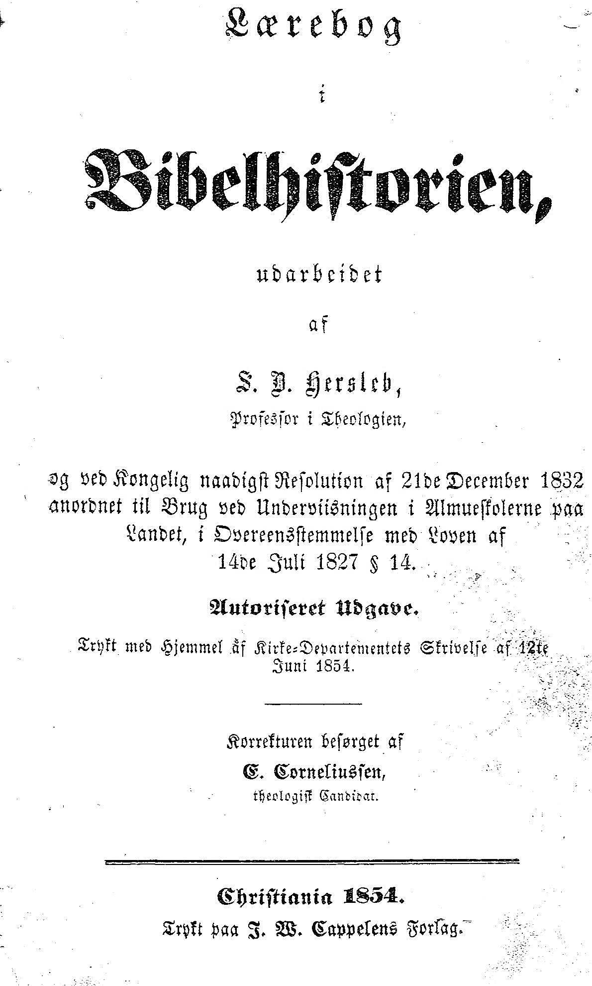 Svend Brochmand Herslebs bibelhistorie, utgitt i Christiania 1854 på Cappelens forlag.